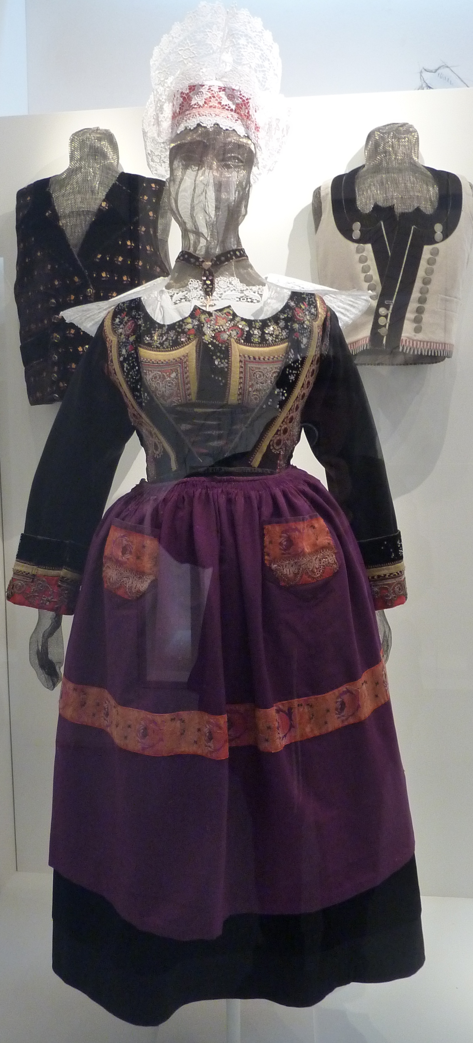 Femme en costume d'Elliant : costume de cérémonie en velours brodé, soie et perles porté dans les régions de Pont-Aven, Rosporden et Fouesnant vers 1890 (fin du XIXe siècle, musée de Bretagne, Rennes)